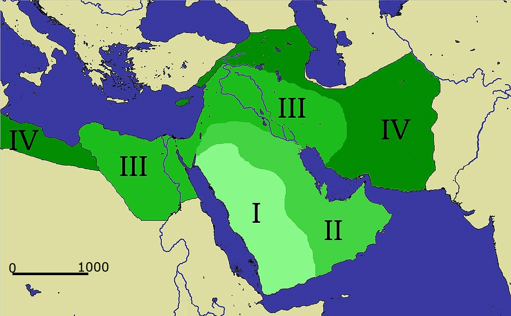 Conquêtes musulmanes des premiers califes